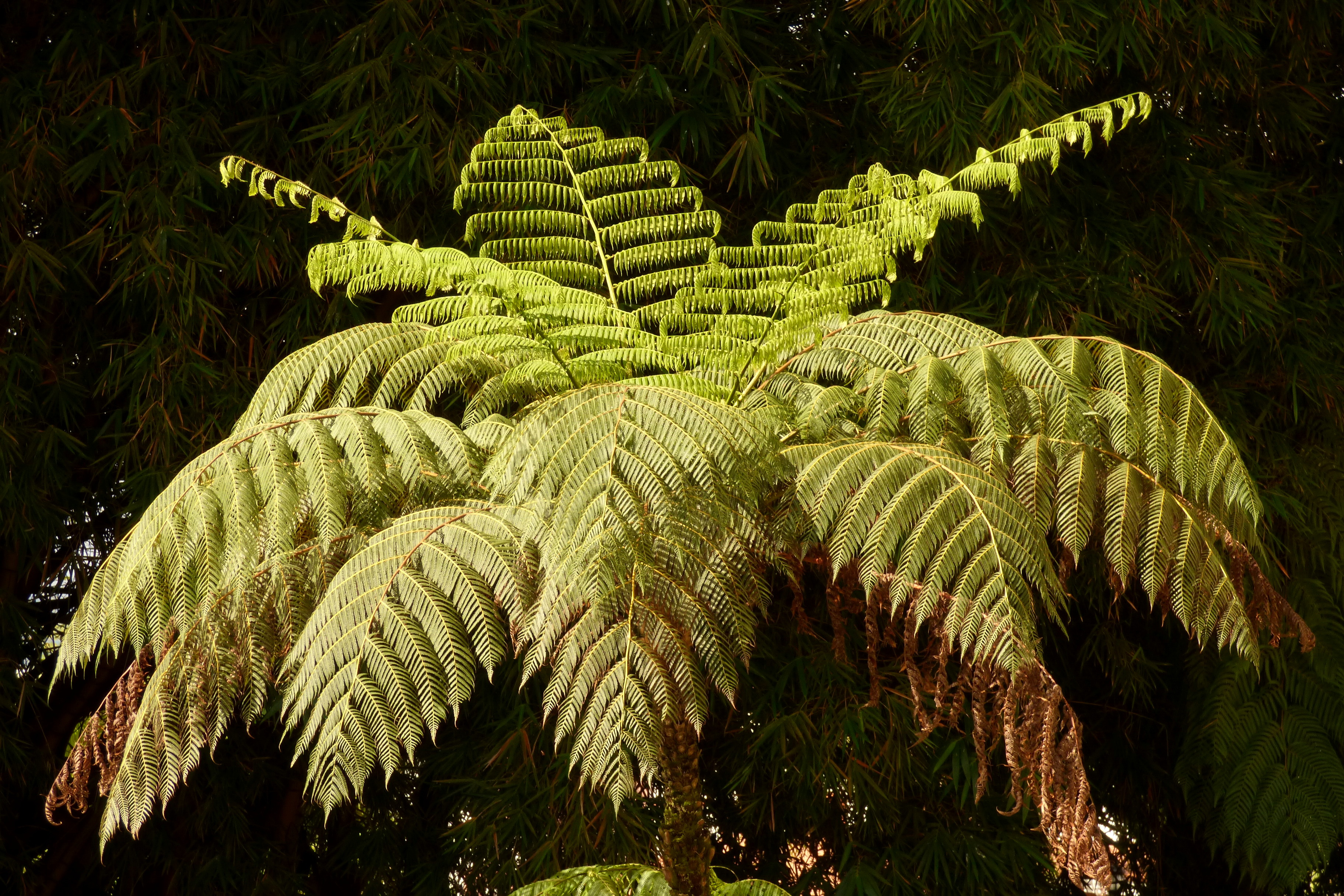 Sarro - Palma boba (Cyathea microdonta)